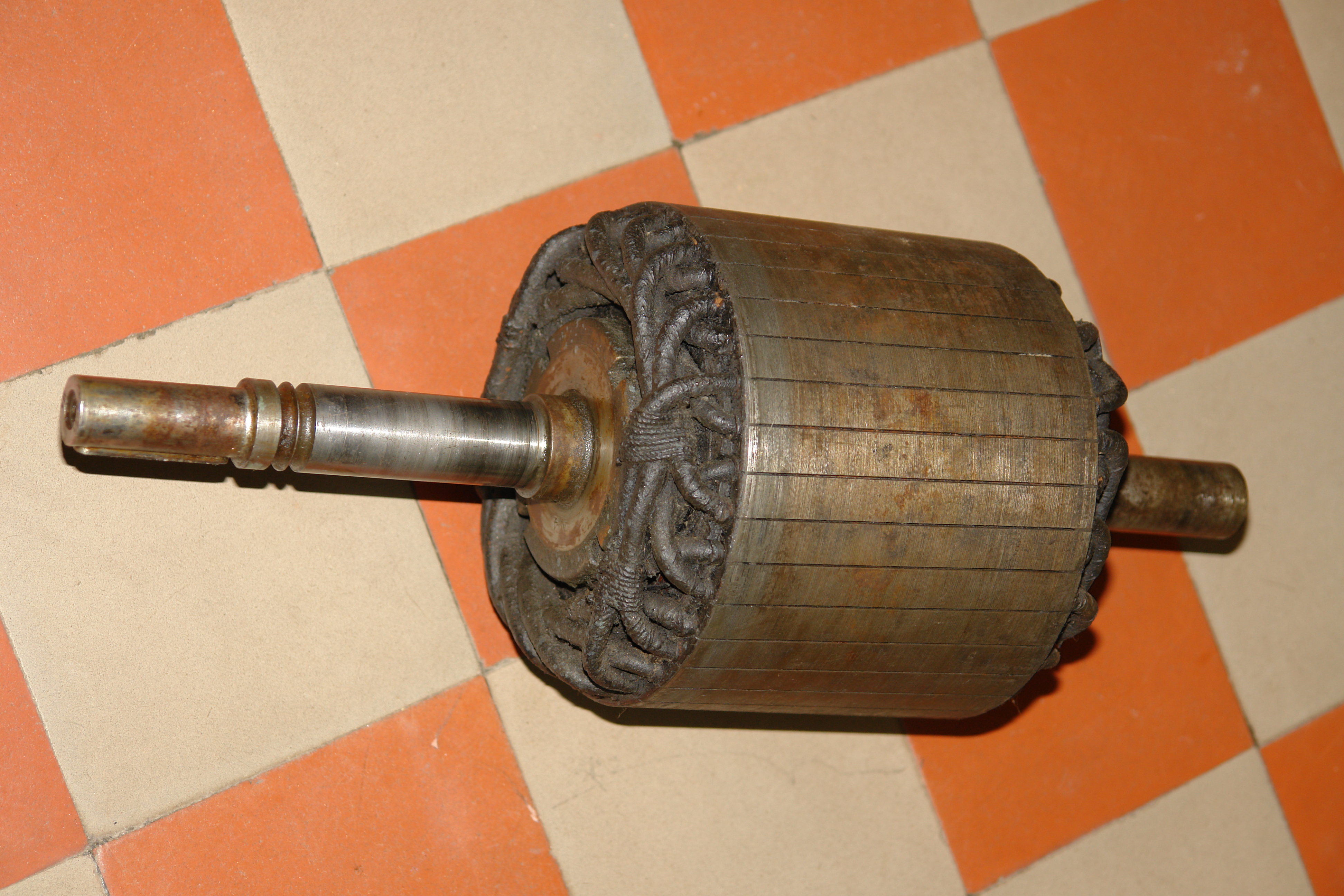 Vue avant d'un rotor d'un moteur à induction, diphasé, fabriqué par R. Alioth et Cie, numéro 1042, daté vers 1891. Hormis sa date, l'intérêt de ce moteur réside dans le circuit du rotor, il est en effet l'ancêtre de la cage d'écureuil. Constitué d'un fil en cuivre épais branché en court-circuit, totalement isolé en double couche coton sur toute sa longueur et de surcroit gainé d'un autre isolant dans les encoches qui sont légèrement inclinées, que l'on distingue très bien sur cette photo. L'on peut voir aussi que les deux cotés du rotor sont eux aussi isolés. Cette fabrication complexe à été très éphémère car l'invention de la cage d'écureuil plus simple de conception l'a très vitre remplacé.